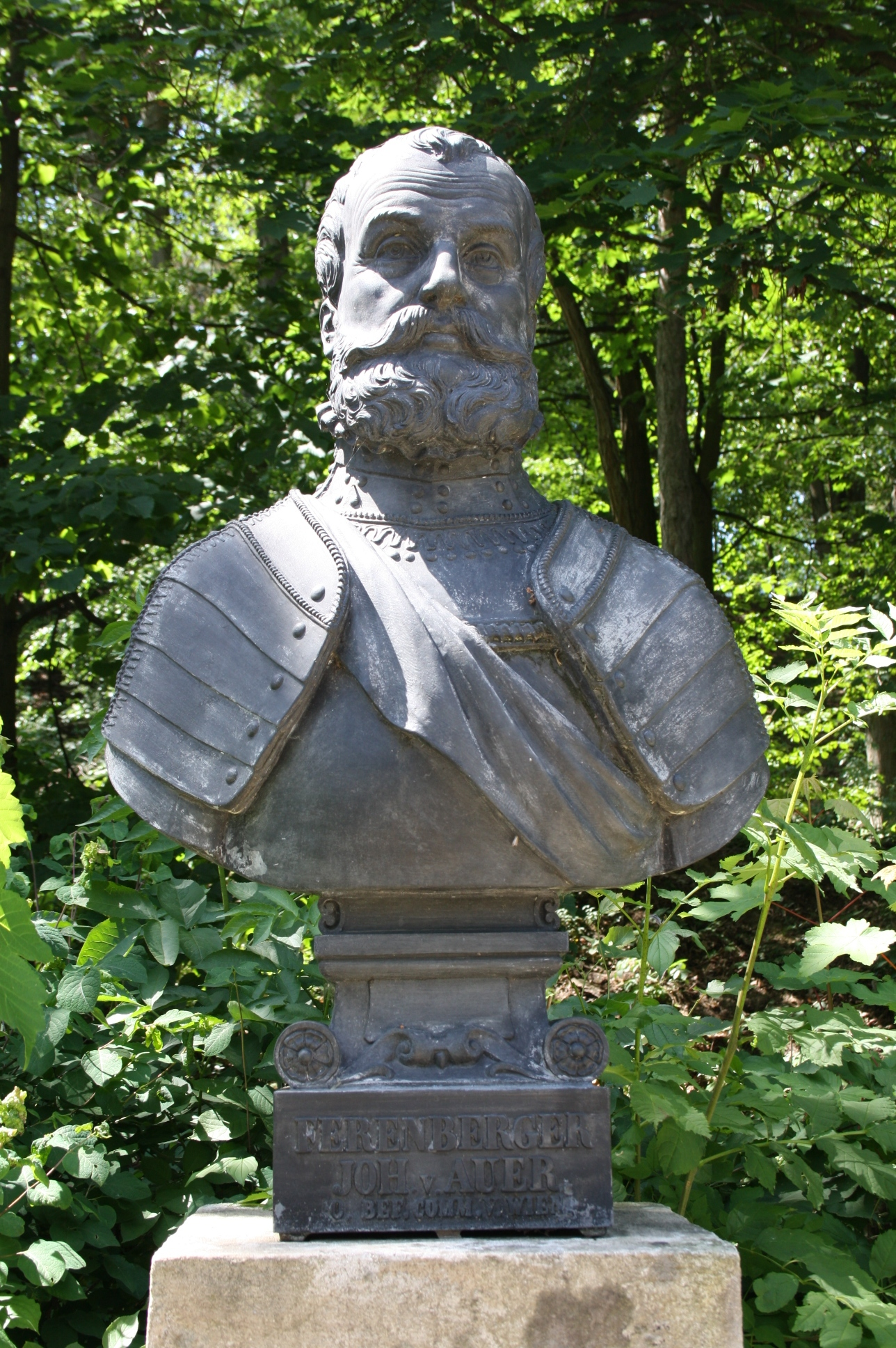 Büste in der Gedenkstätte Heldenberg (Niederösterreich)